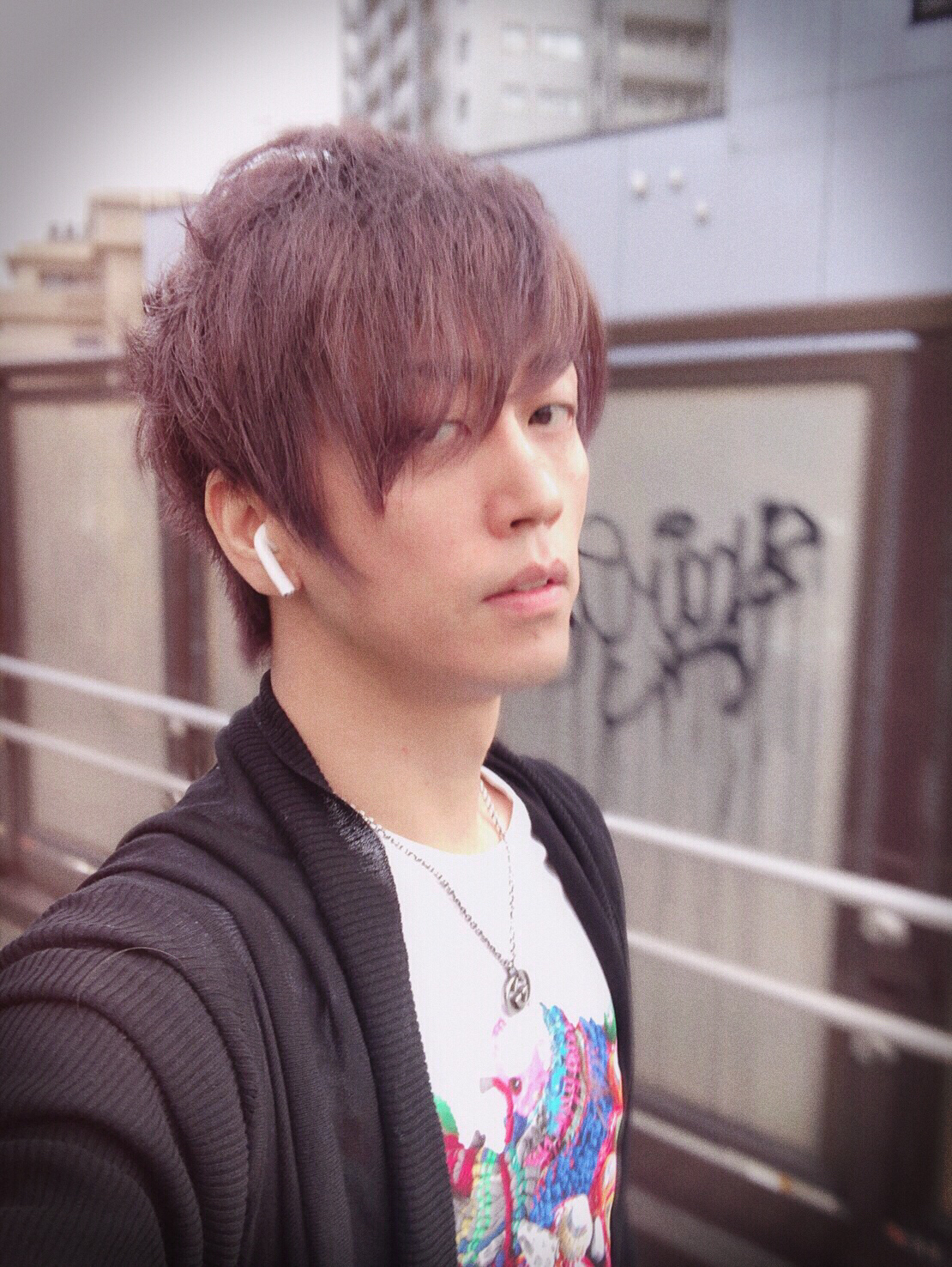 横田大地氏